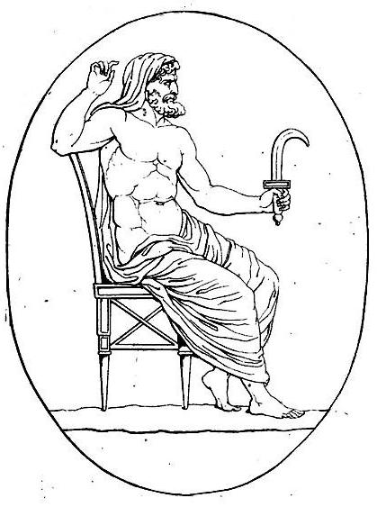 Cronos_armé_de_la_faucille_(harpè)_contre_son_père_et_divers_médaillons_pierre_gravée